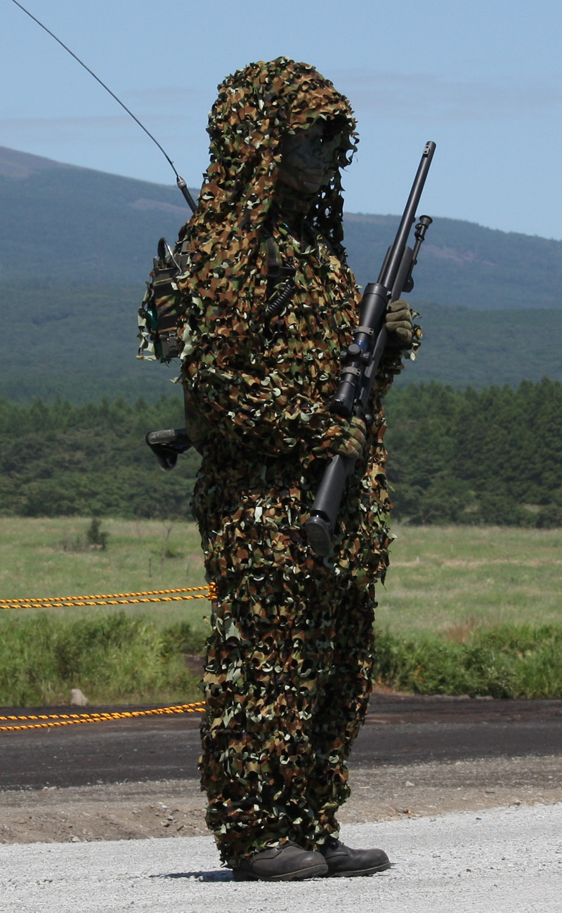 2009年の総合火力演習にて